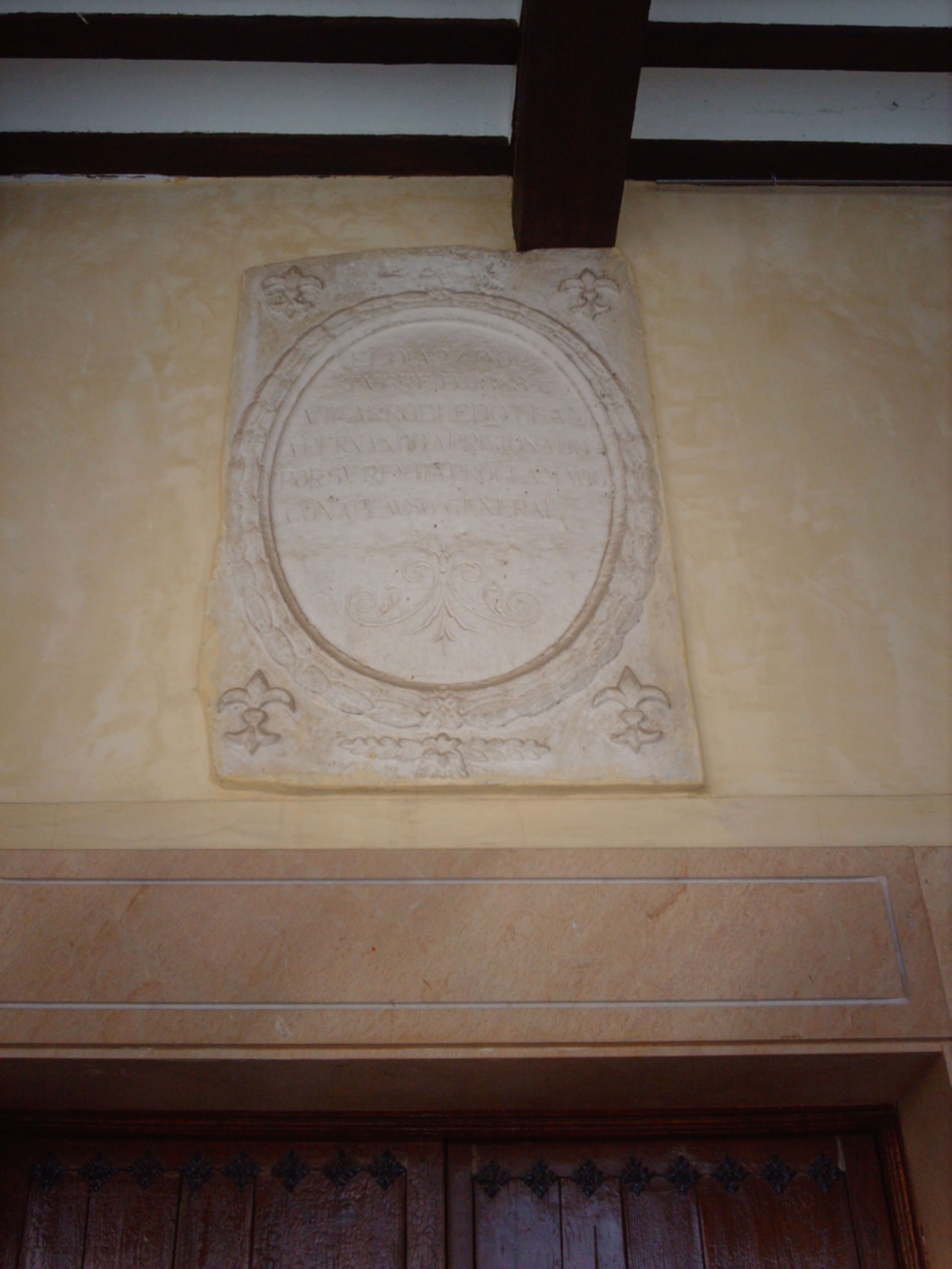 Inscripción de 1808 en la arcada del Ayuntamiento de Villarrobledo.